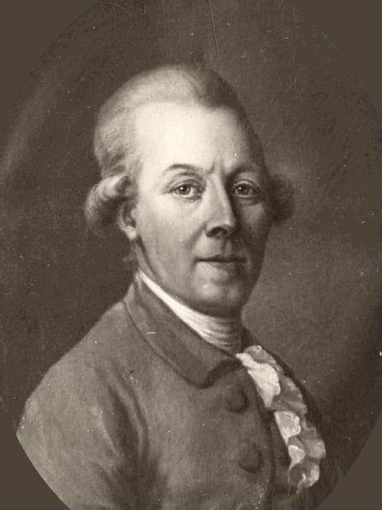 Portrait of Otto Friedrich von Stackelberg (1731-1808)